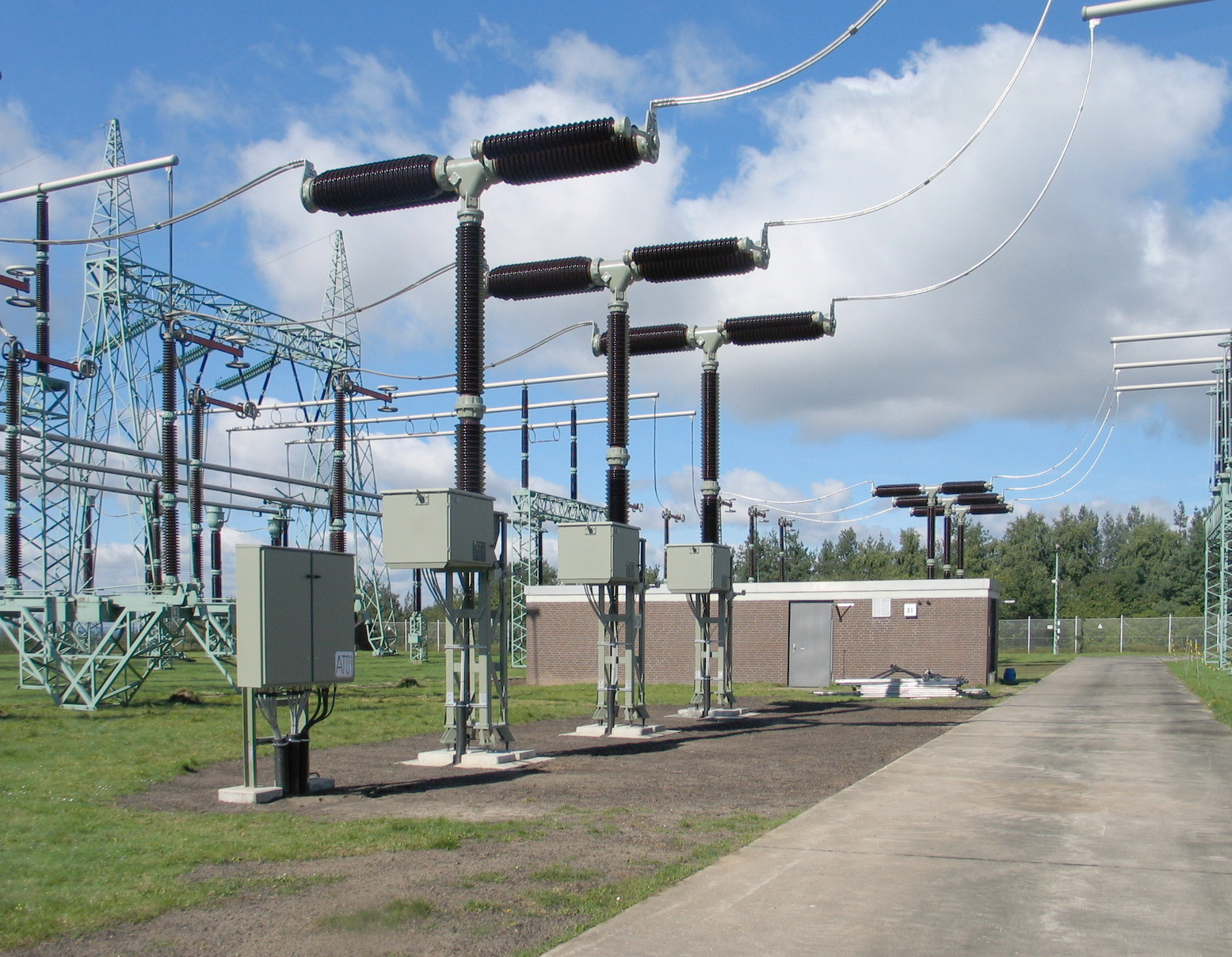 Mehrere Lastschalter in der 380-kV-Freiluftschaltanlage am Kernkraftwerk Krümmel (KKK)